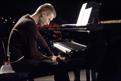 Kamil Urbański